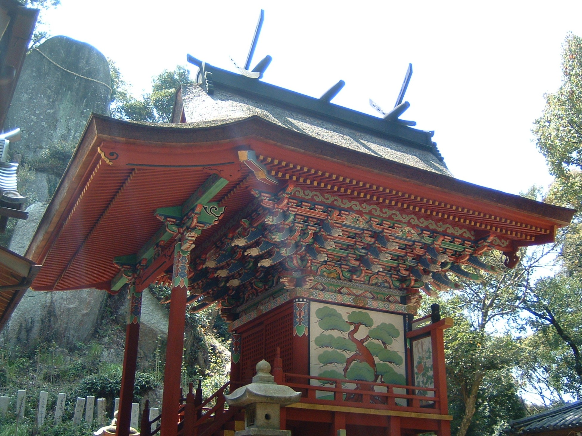 岩上神社